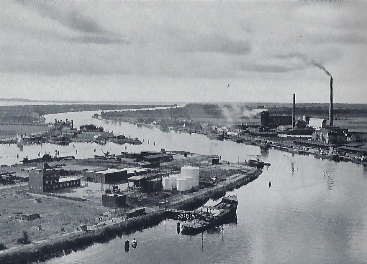 Großtankanlage der Rhenania-Ossag im neuen Königsberger Hafen (Hafenbecken IV) und die Zellstoff-Fabrik auf dem Nordufer des Pregels; im Hintergrund das Frische Haff